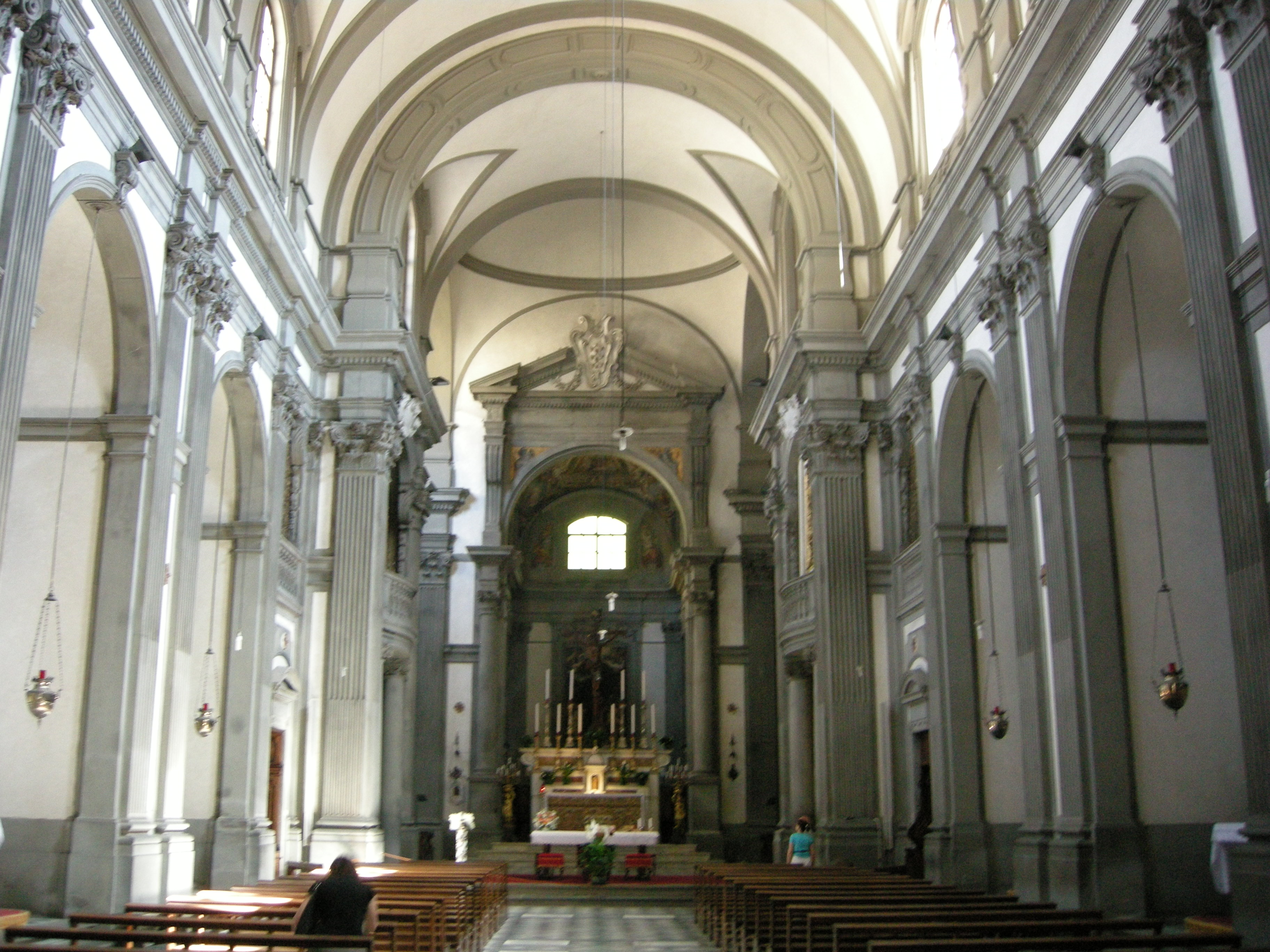 Santa felicita, interno